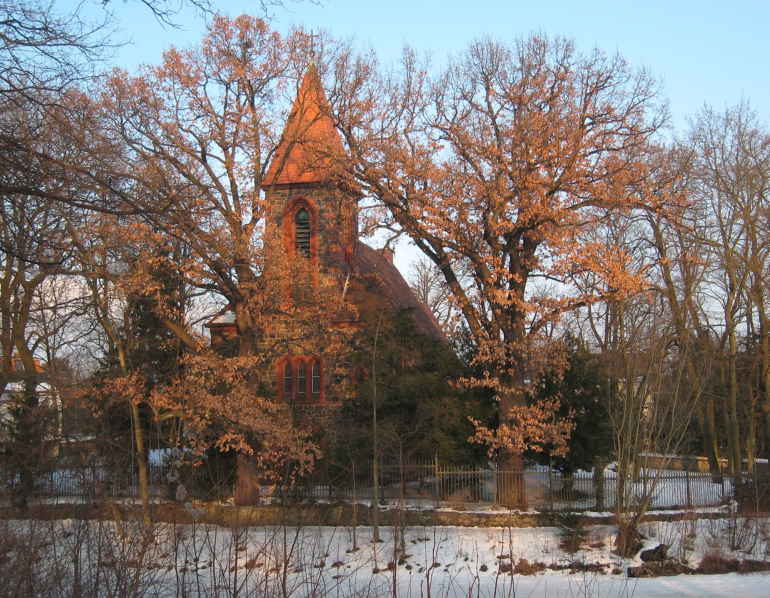 Alte Dorfkirche in Berlin-Britz